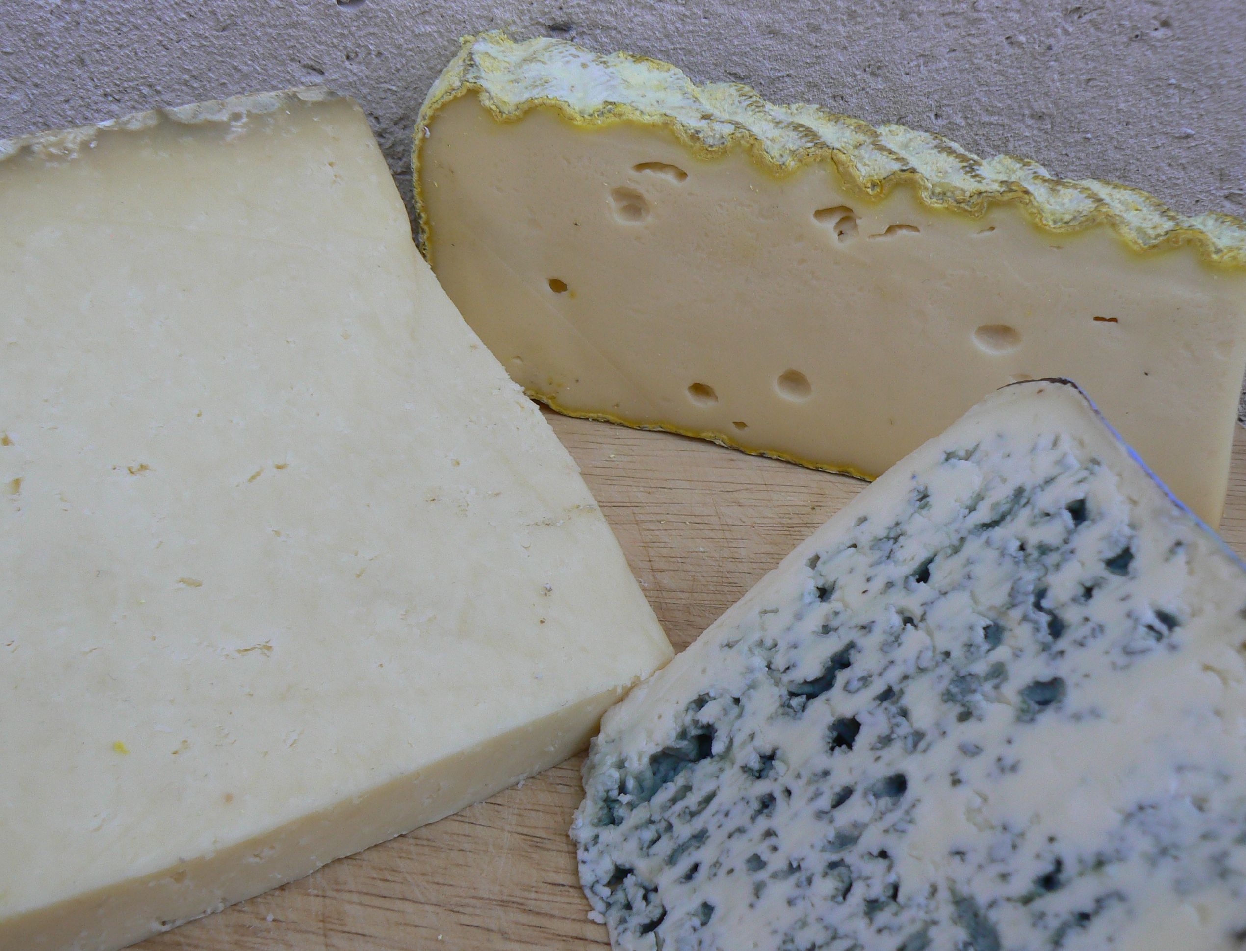 Tres formatges occitans